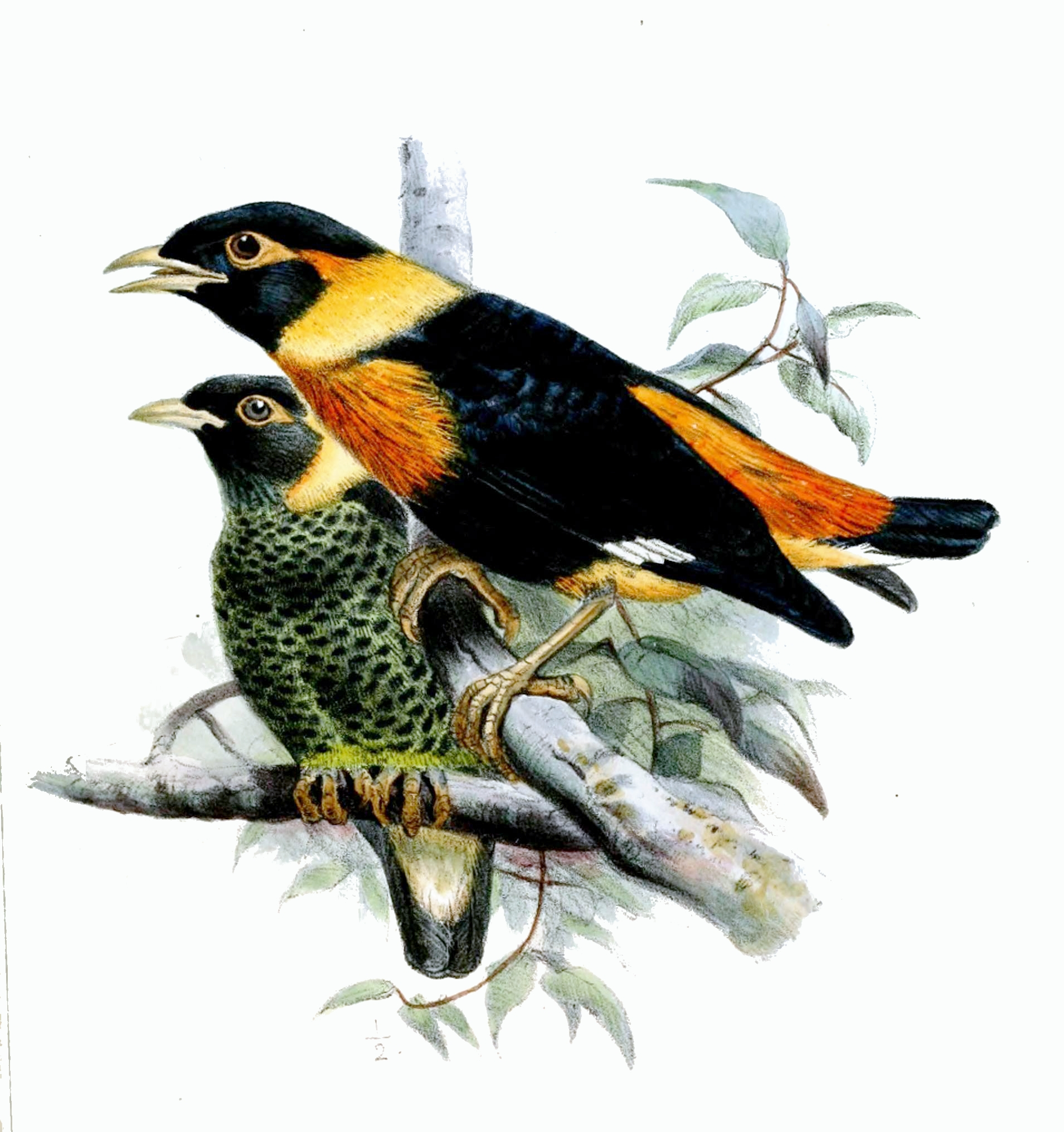 Gracula pectoralis = Mino anais